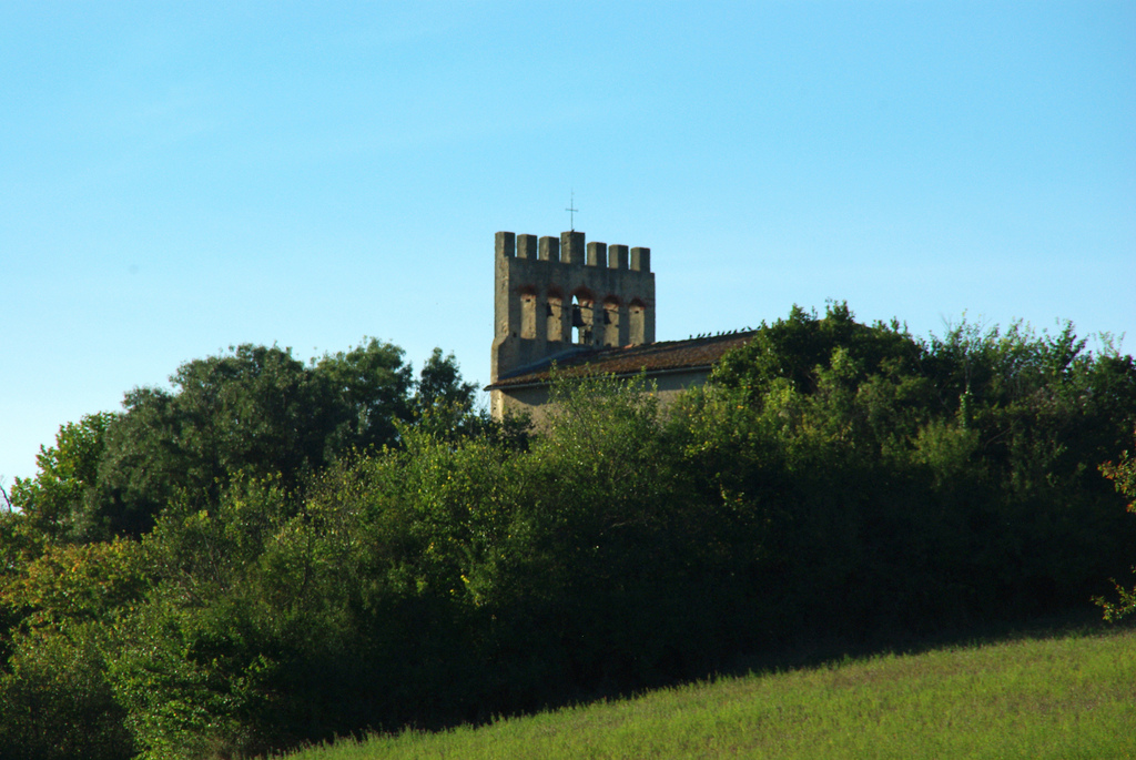 Seul le clocher fortifié du petit village émerge de la végétation. .